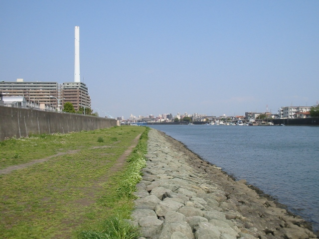 旧江戸川 Kyu-Edogawa River